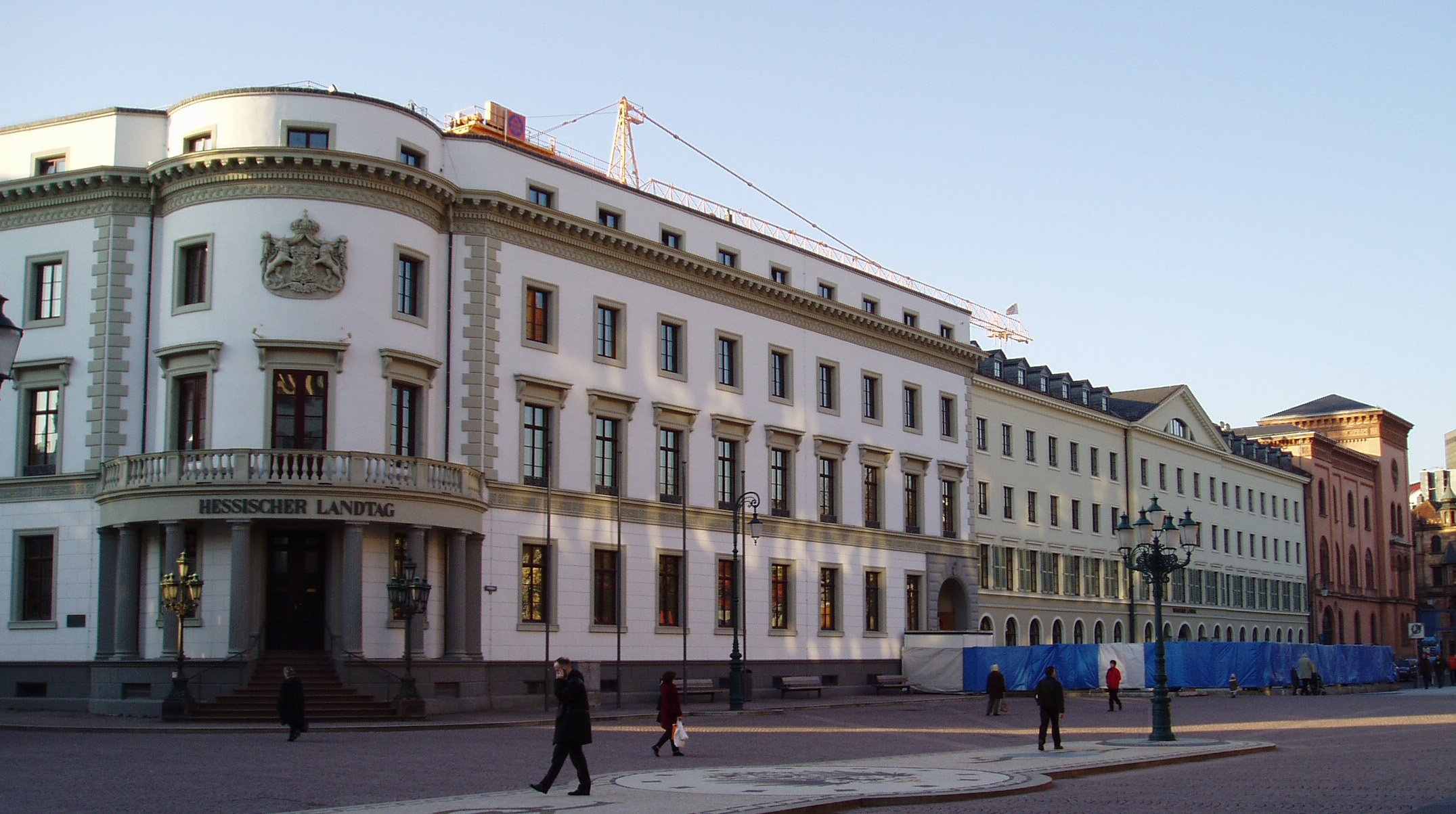 Das Bild zeigt das 1841 erbaute nassauische Stadtschloss in Wiesbaden mit seinen angrenzenden Gebäuden Kavaliershaus und Wilhelmsbau, aufgenommen vom Schloßplatz. Alle Gebäude gehören heute zum Komplex des Hessischen Landtags.